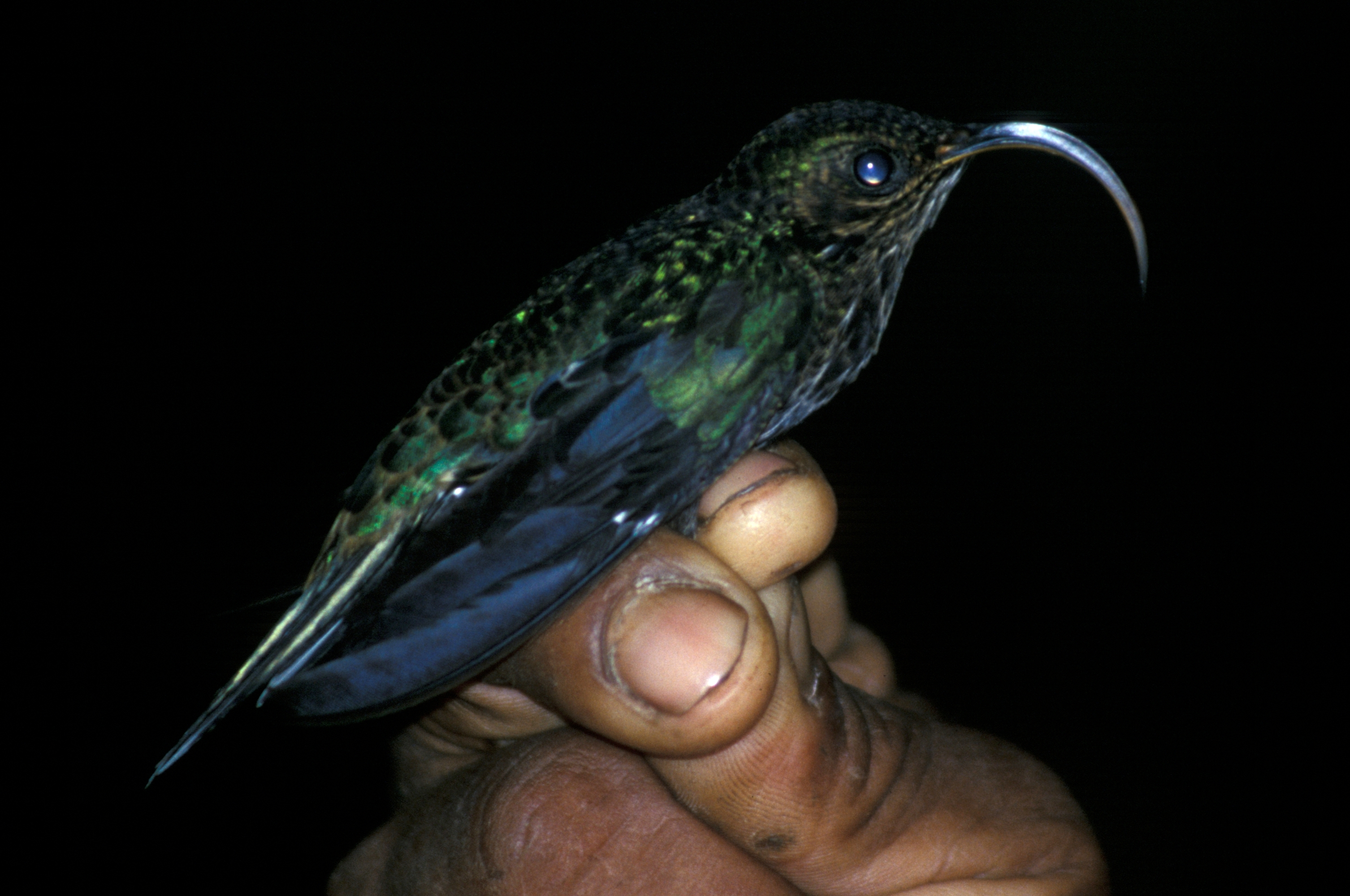 White-tipped Sicklebill (Eutoxeres aquila). From Cordillera del Cóndor, Ecuador.